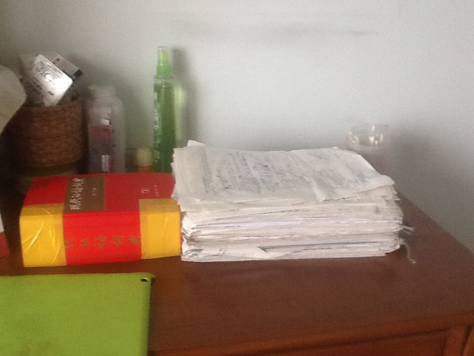 右侧为一名中国大陆高一学生在高一下学期做的卷子。可明显看出厚度超过中国大陆的《现代汉语词典》。